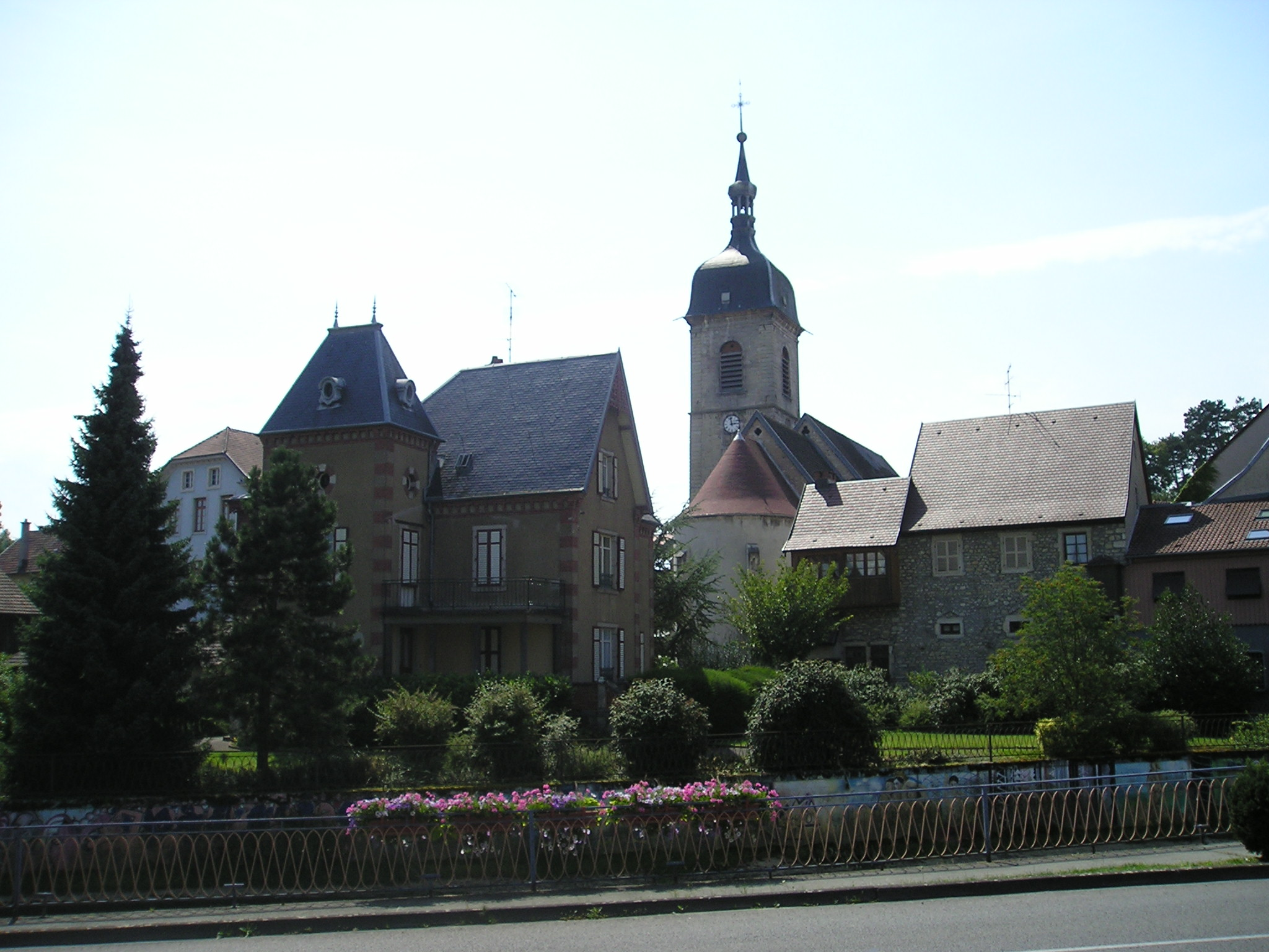 Delle_mit_der_Kirche_Saint-Léger